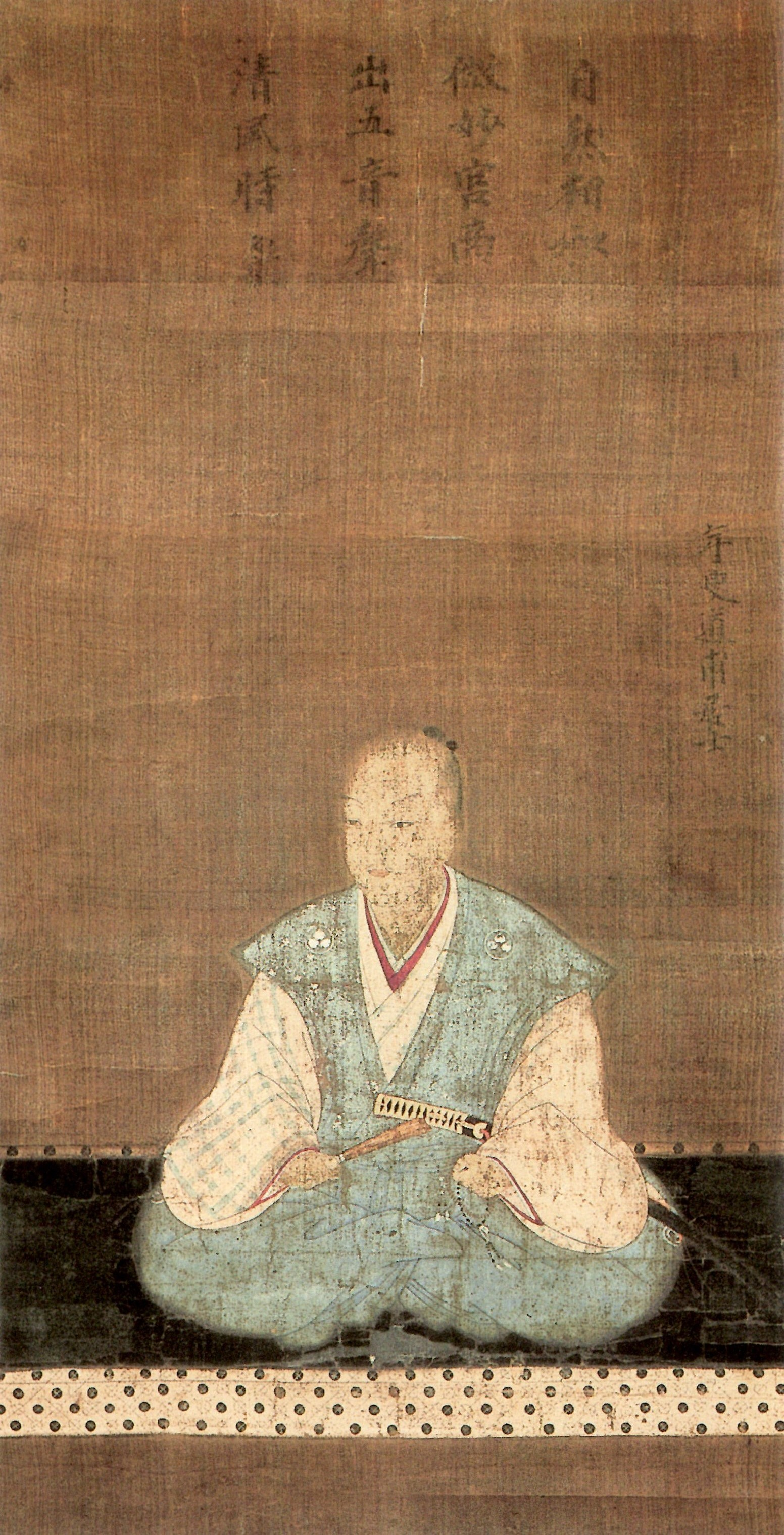 松平清康像、随念寺蔵。岡崎市指定文化財。